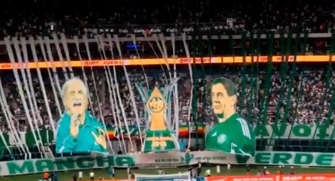 Mosaico realizado pela torcida do Palmeiras na festa do decacampeonato brasileiro realizada no Allianz Parque na última rodada do Brasileirão 2018